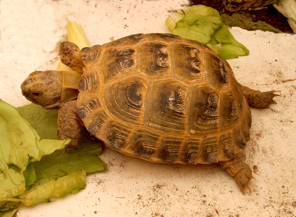 Testudo horsfieldii, Napoli, Italia